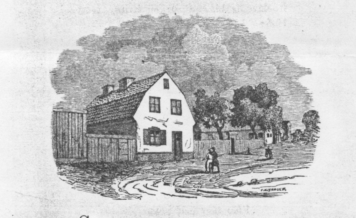 Faggens krog (kädesfabrik)